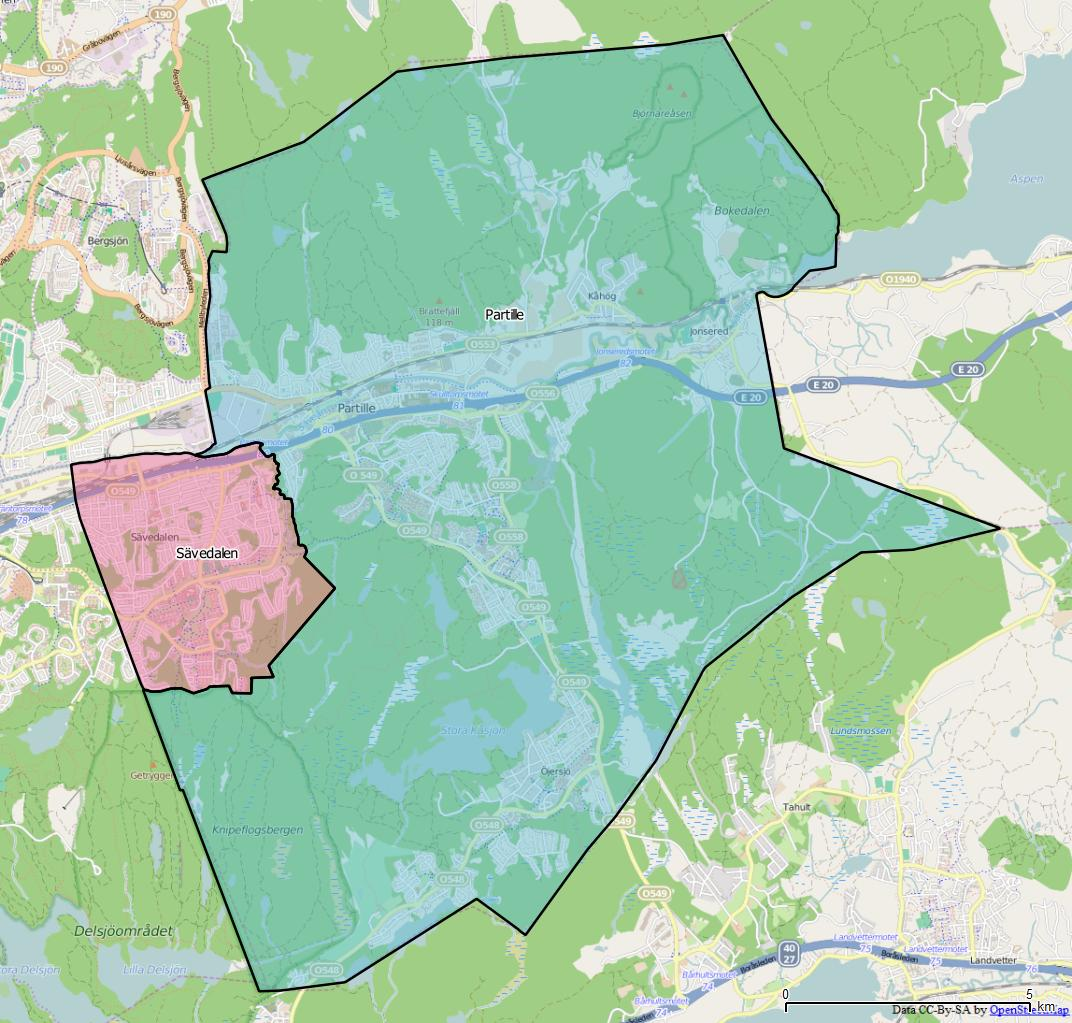 Distriktsindelningen i Partille kommun World file: 20.45309766765614867 0 0 -20.45309766765614867 1340413.20802846923470497 7921110.46958090085536242